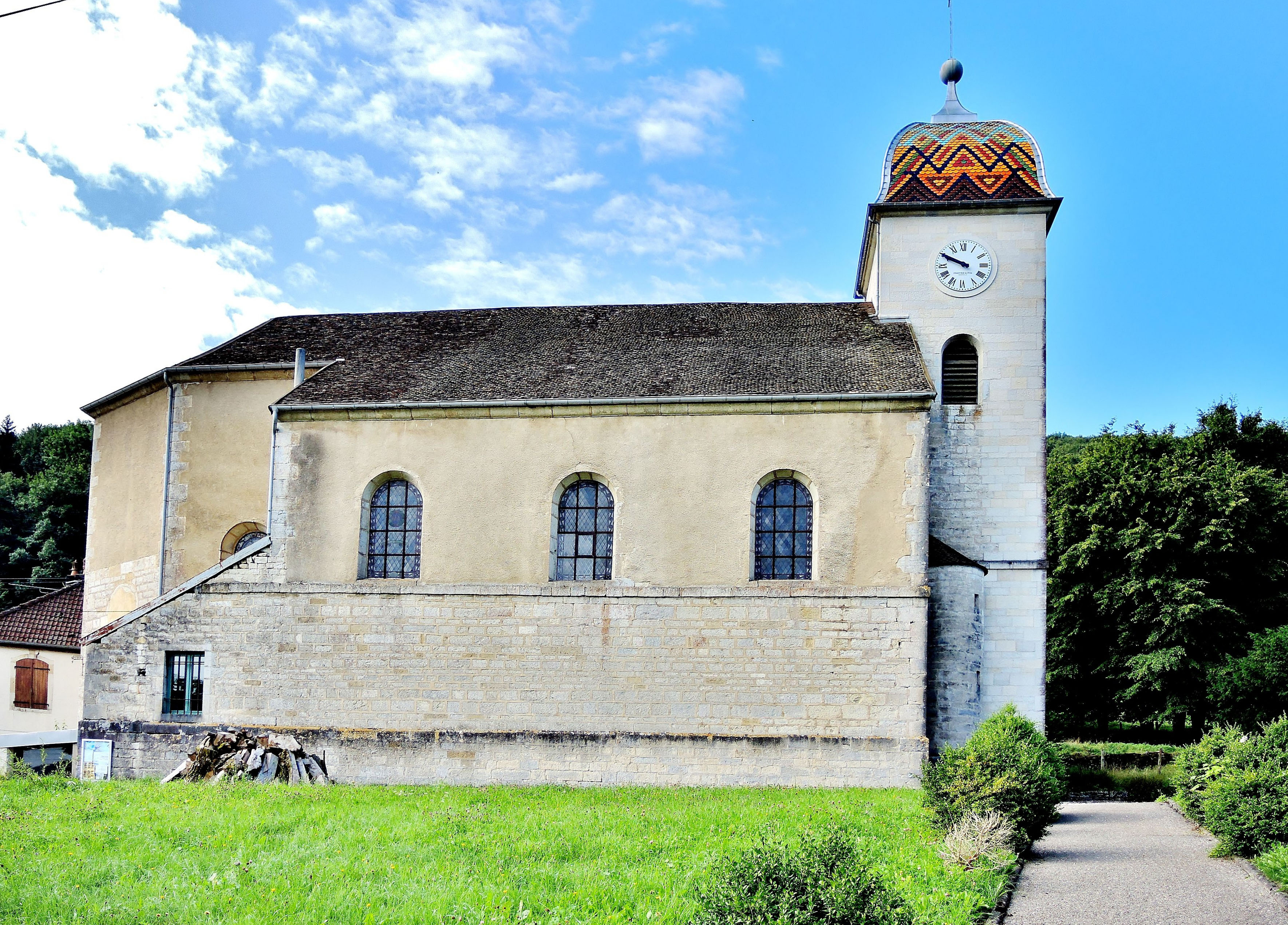 Eglise Saint Michel de Roulans. Doubs